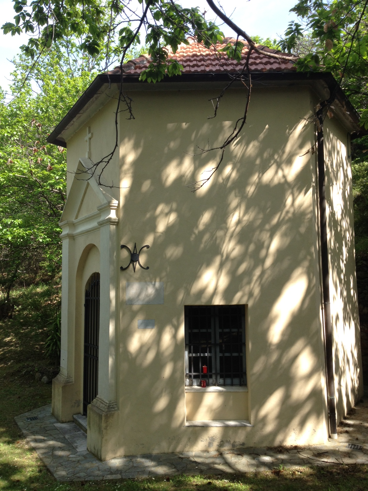 Santuario Santa Maria Ausiliatrice, Orco Feglino (SV) Italy